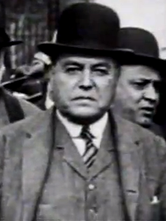 Hipolito Yrigoyen, circa 1929.